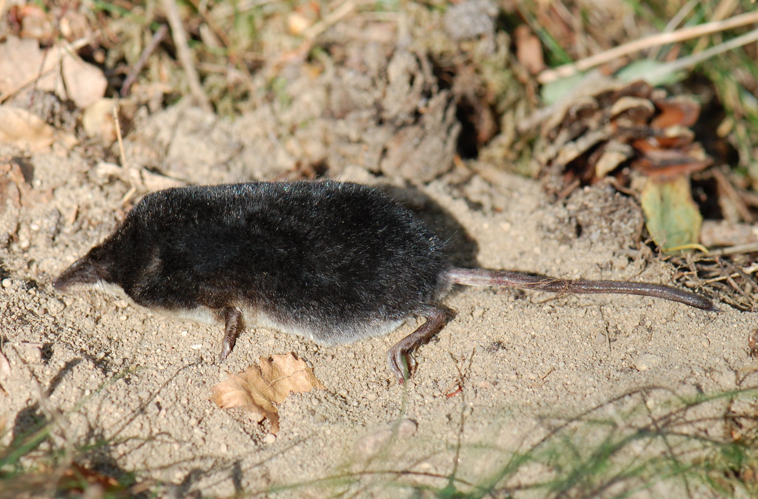 Wasserspitzmaus (Neomys fodiens), Totfund. Tangersdorf, Kreis Uckermark, Brandenburg, Deutschland.